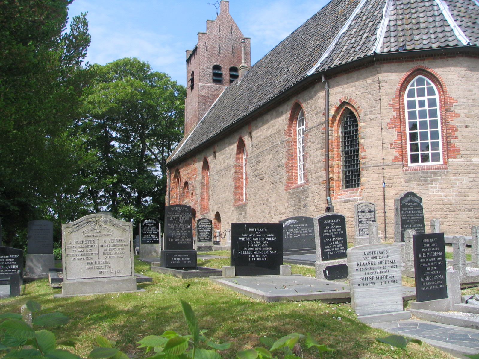 Hegebeintum, tsjerke